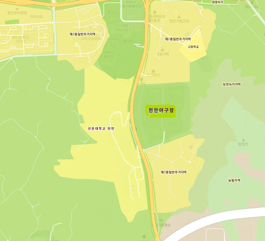 천안야구장